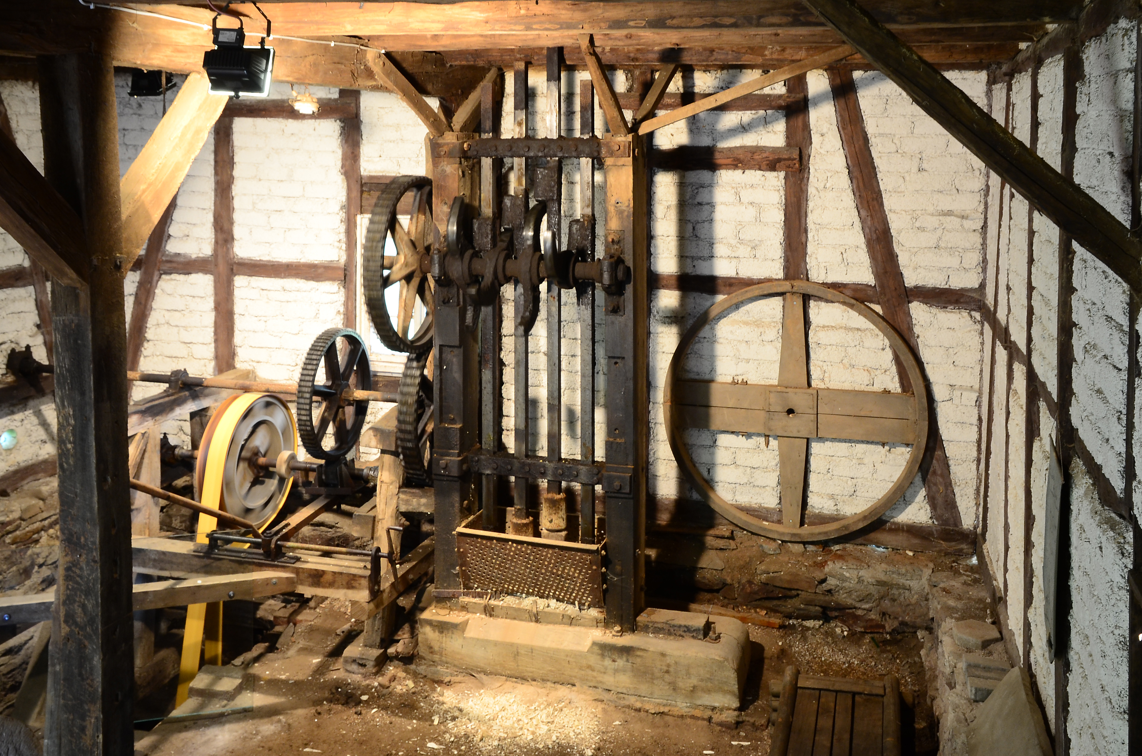 Pochwerk in Aktion mit Antrieb in der Knochenmühle Fretter, Schöndelter Straße 11, Finnentrop-Fretter